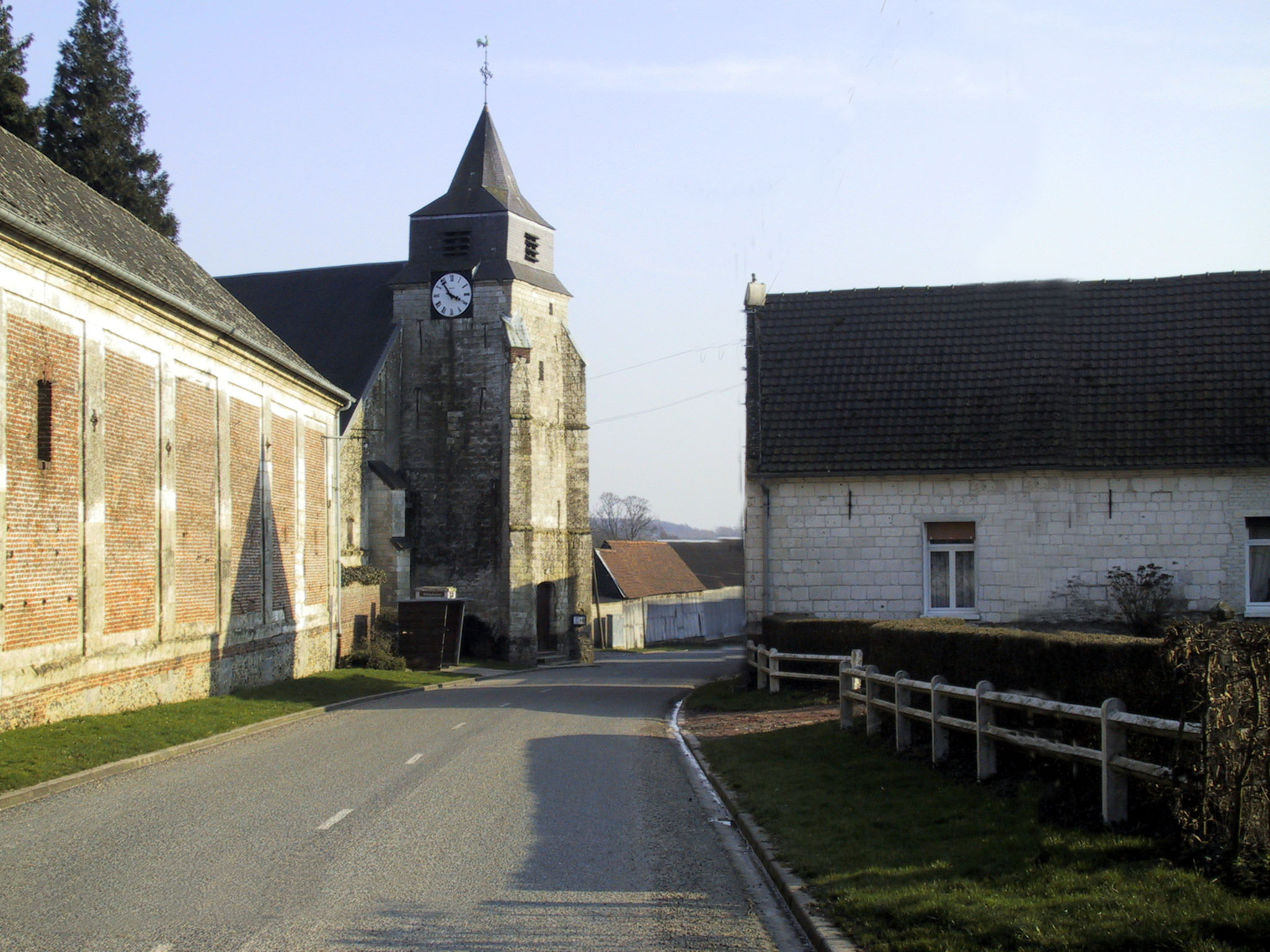 L'église de Couin